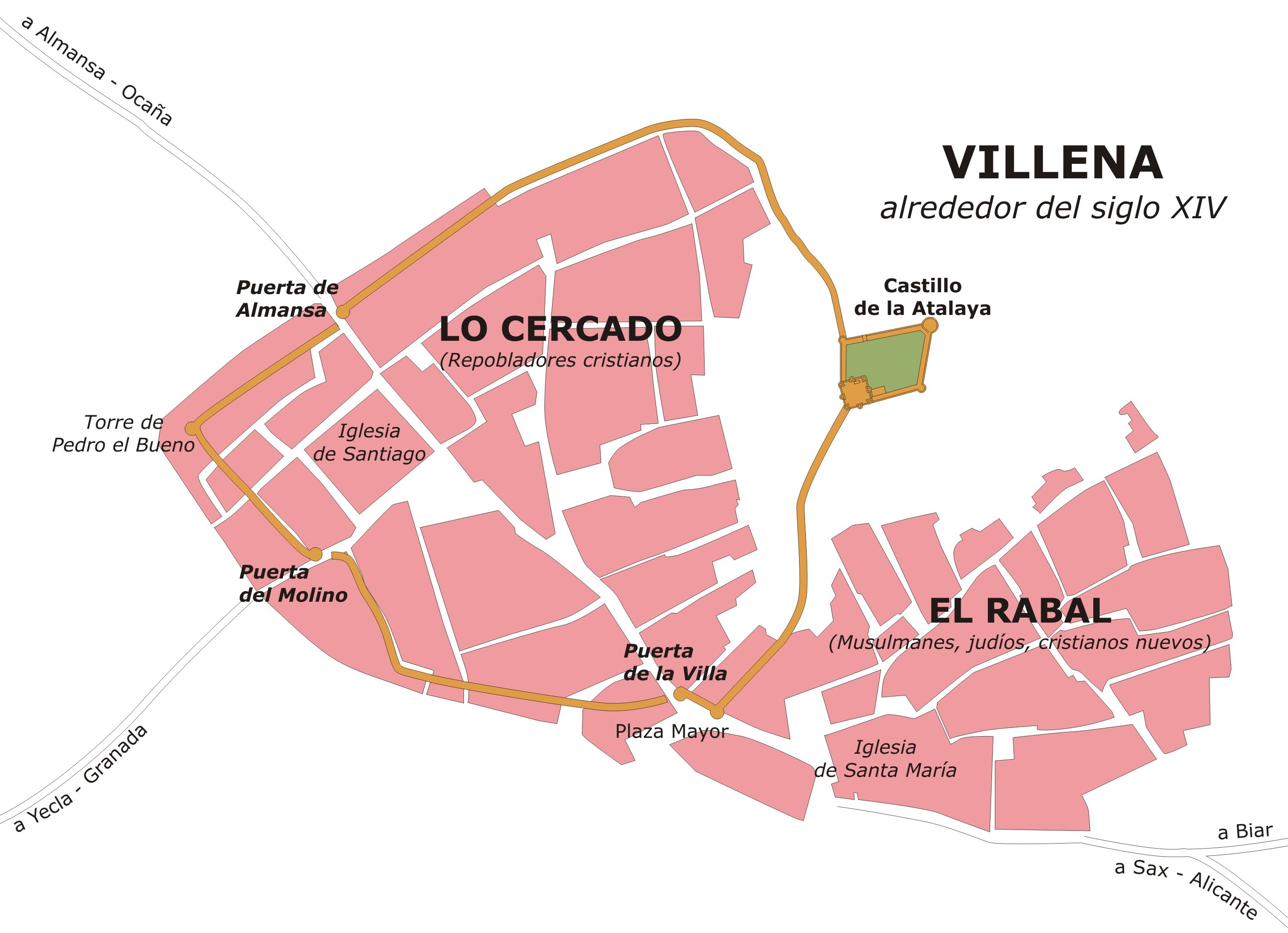 Reconstrucción hipotética de la planta de la entonces villa de Villena en alrededor del siglo XIV, según descripciones del arqueólogo José María Soler. Se marcan los principales hitos de la ciudad, así como los principales grupos de población que habitaban en cada barrio.